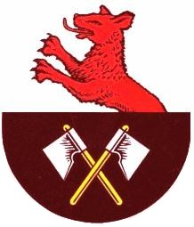 Altes Wappen von Heiligenbeil (Ostpreußen)